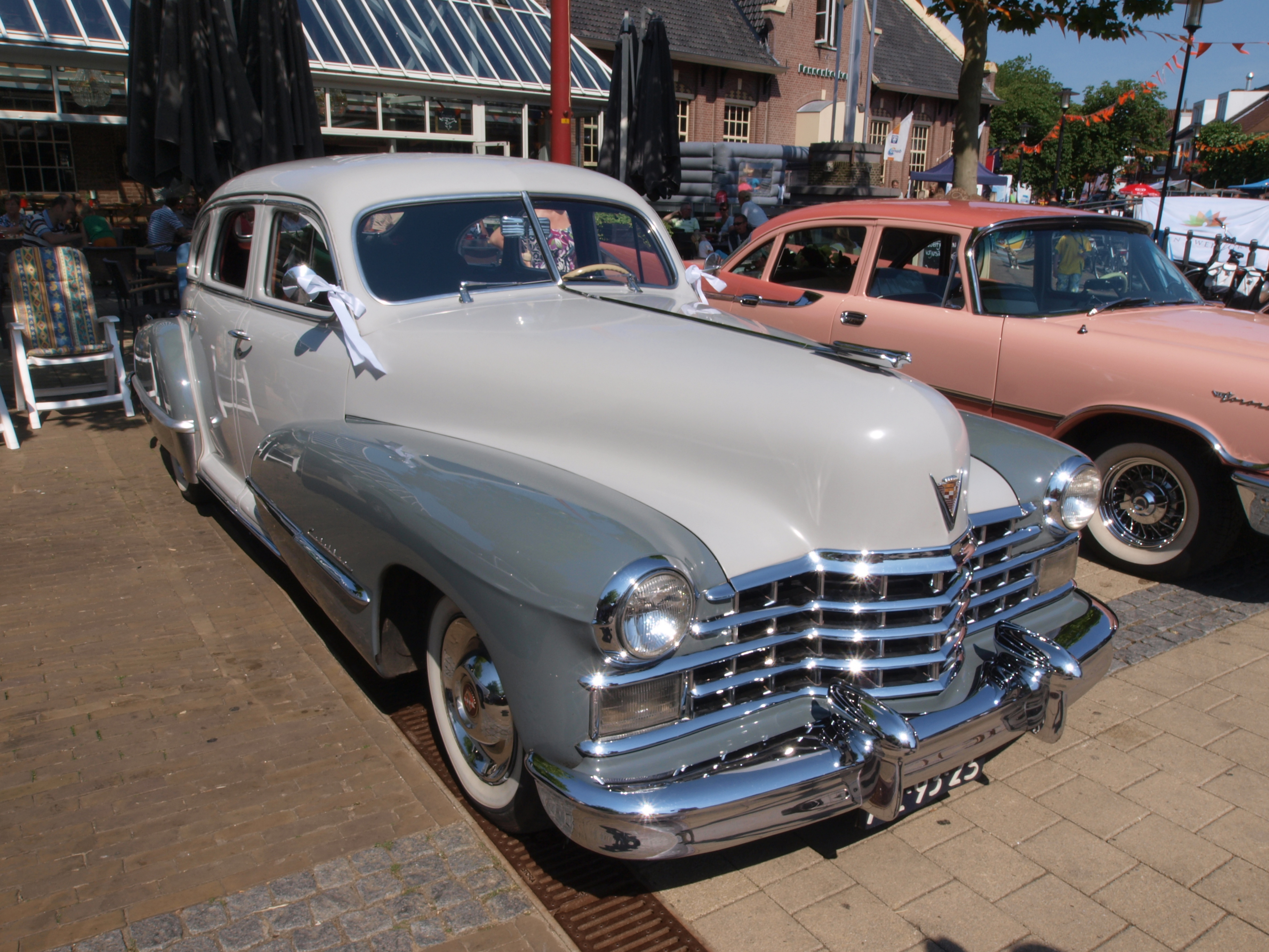 Photographed at the SPECIAAL Auto Evenement Nijkerk 2011.